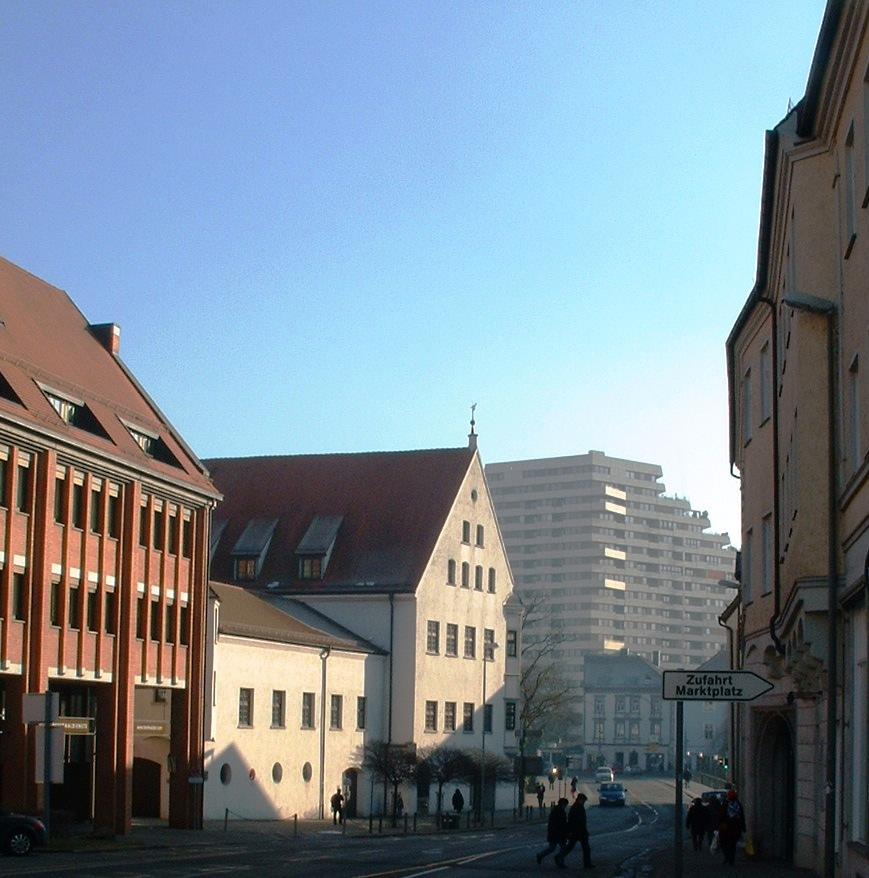 Blick von Ulm aus nach Neu-Ulm die Donaustraße hinunter, welche dann in die Herdbrücke übergeht (die beiden Autos befinden sich auf der Brücke). Die Mitte der Brücke ist die Grenze zwischen Neu-Ulm und Ulm und damit auch die Grenze zwischen Bayern und Baden-Württemberg. Schon in den Anfängen Ulms war dieser Straßenzug mit einer Furt durch die Donau ein bedeutender Handelsweg. Deswegen wurde da auch der den Übergang beherrschende Reichenauer Hof erbaut, das weiße Gebäude auf der linken Seite, welches sich zunächst mit dem flacheren Remisenbau und dann mit dem zur Straße gebauten Spitzgiebel anschließt an das rote Backsteingebäude (Geschäftshaus und Sitz einiger Ämter der Stadt Ulm). Im Hintergrund das stufige Gebäude ist der wuchtigste Wohnkomplex Neu-Ulms, das Donaucenter.